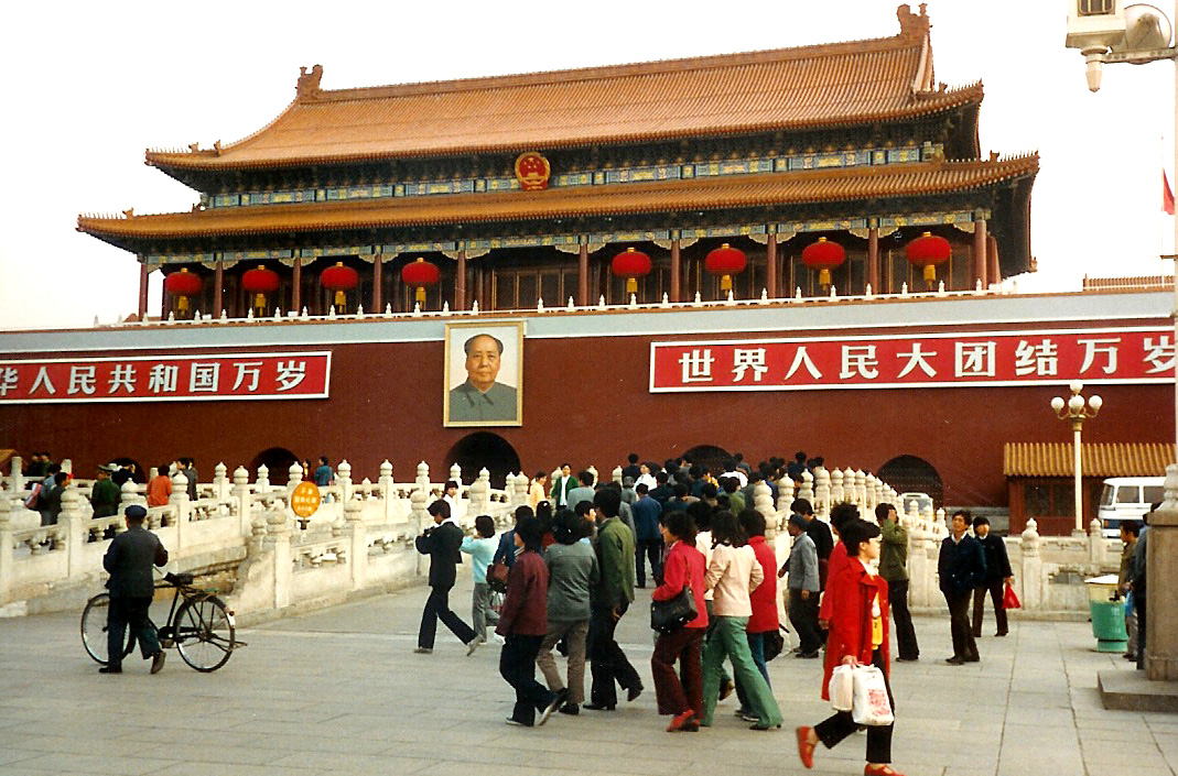 Peking:Verbuede Stad4